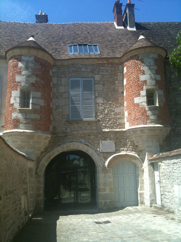 Maison a jean cocteau Milly-la-foret